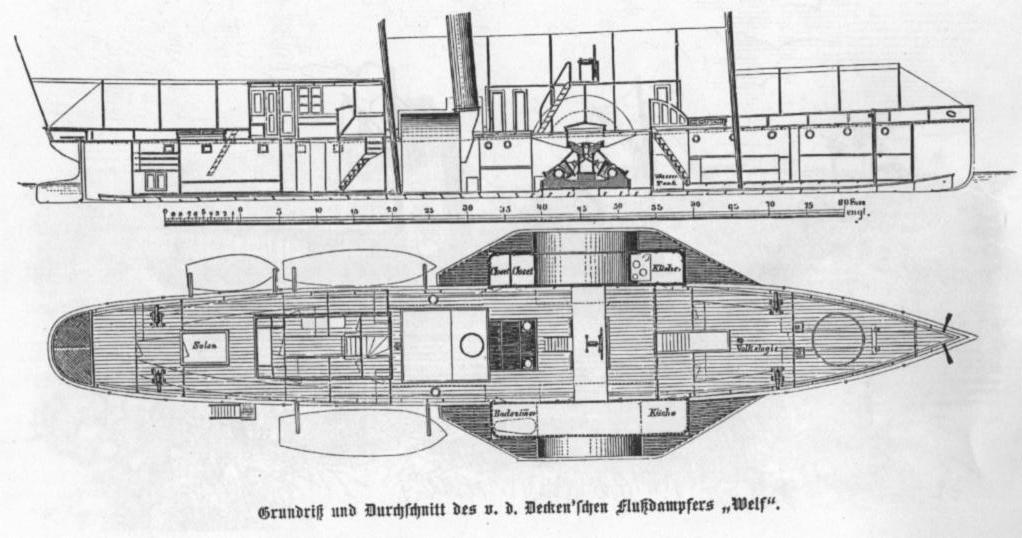 Flußdampfer Welf und Beiboot für die Juba-Flußerkundung von Carl Claus von der Decken Plan Querschnitt und Grundriss